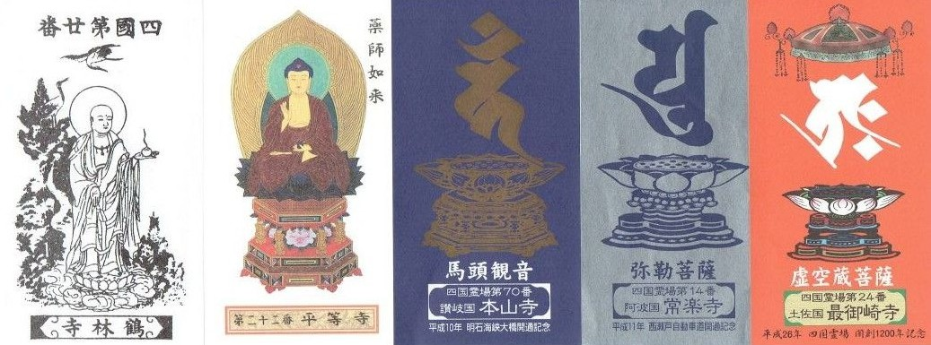 四国八十八箇所の御影